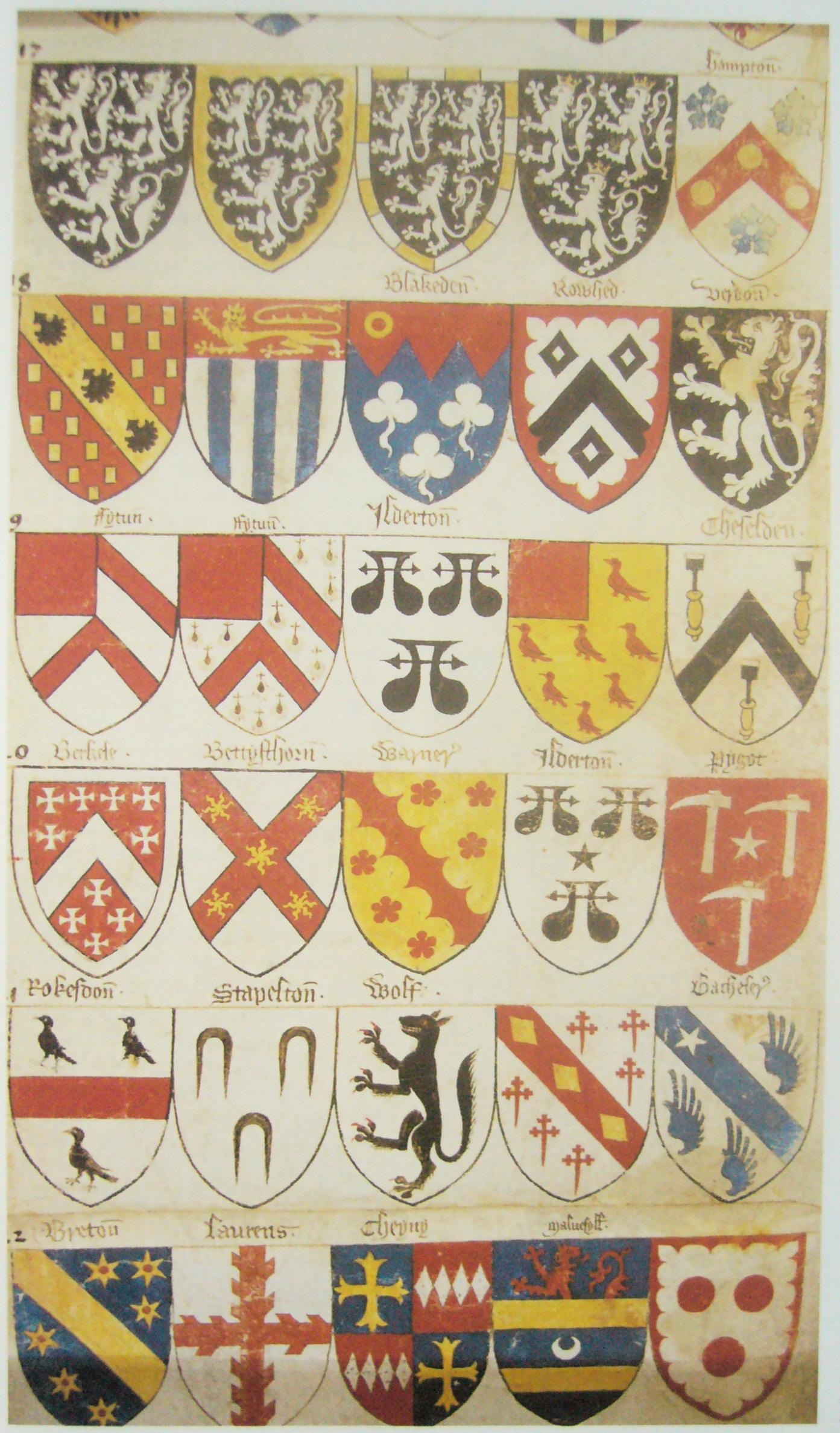 Egy lap az angol Fenwick Roll címertekercsből (1422-1461)